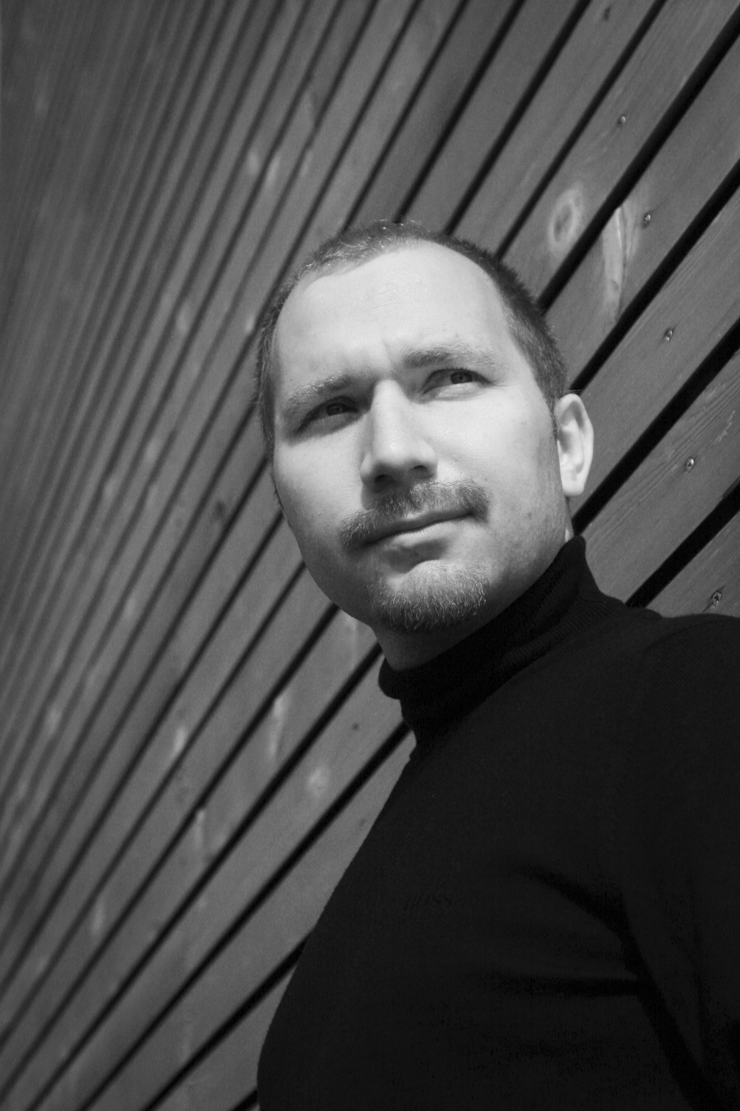 Portrét